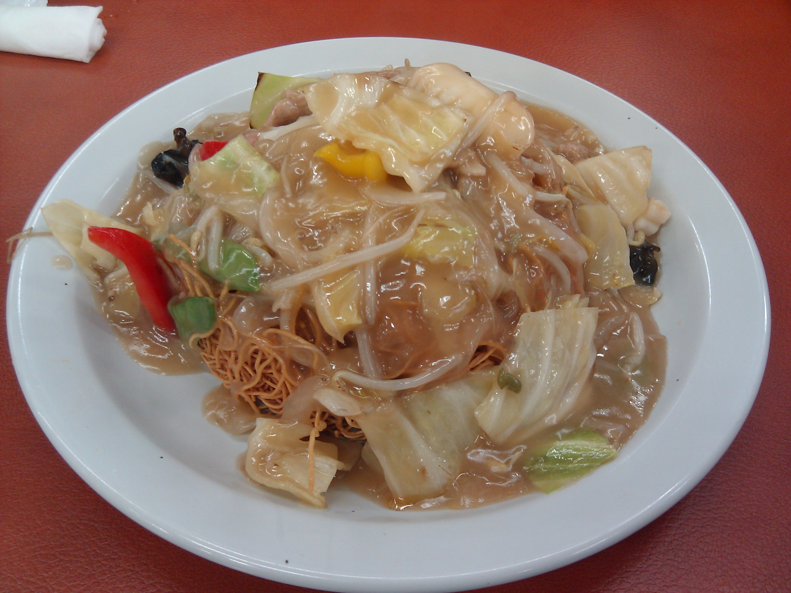 餃子の王将 皿うどん